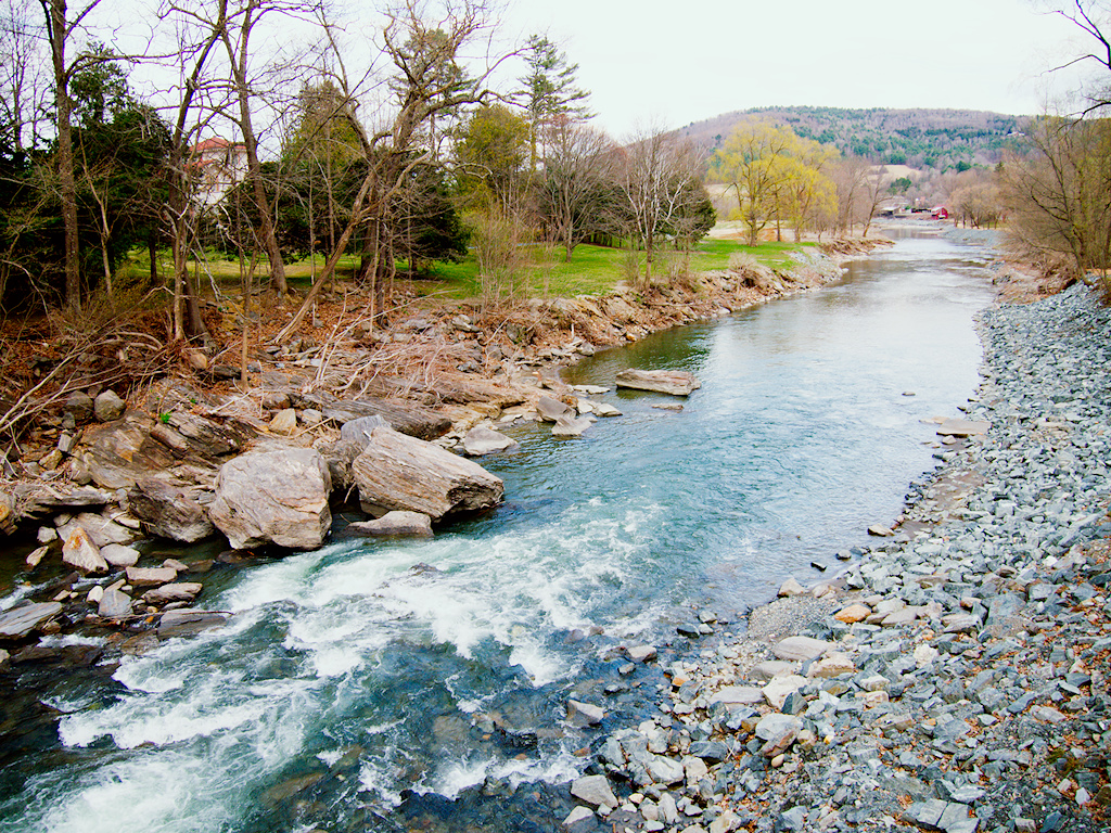 Ottauquechee in Woodstock, Vermont.